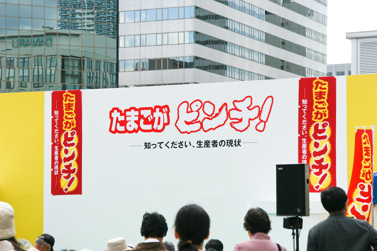 「たまごがピンチ！」 ピンチの書体にピンチ感が出ている。エキサイト翻訳で英訳してみたら、The egg is a pinch. と出てきた。 2008.9.26 「たまごがピンチ！」－知ってください、生産者の現状－ ホクレンのたまご